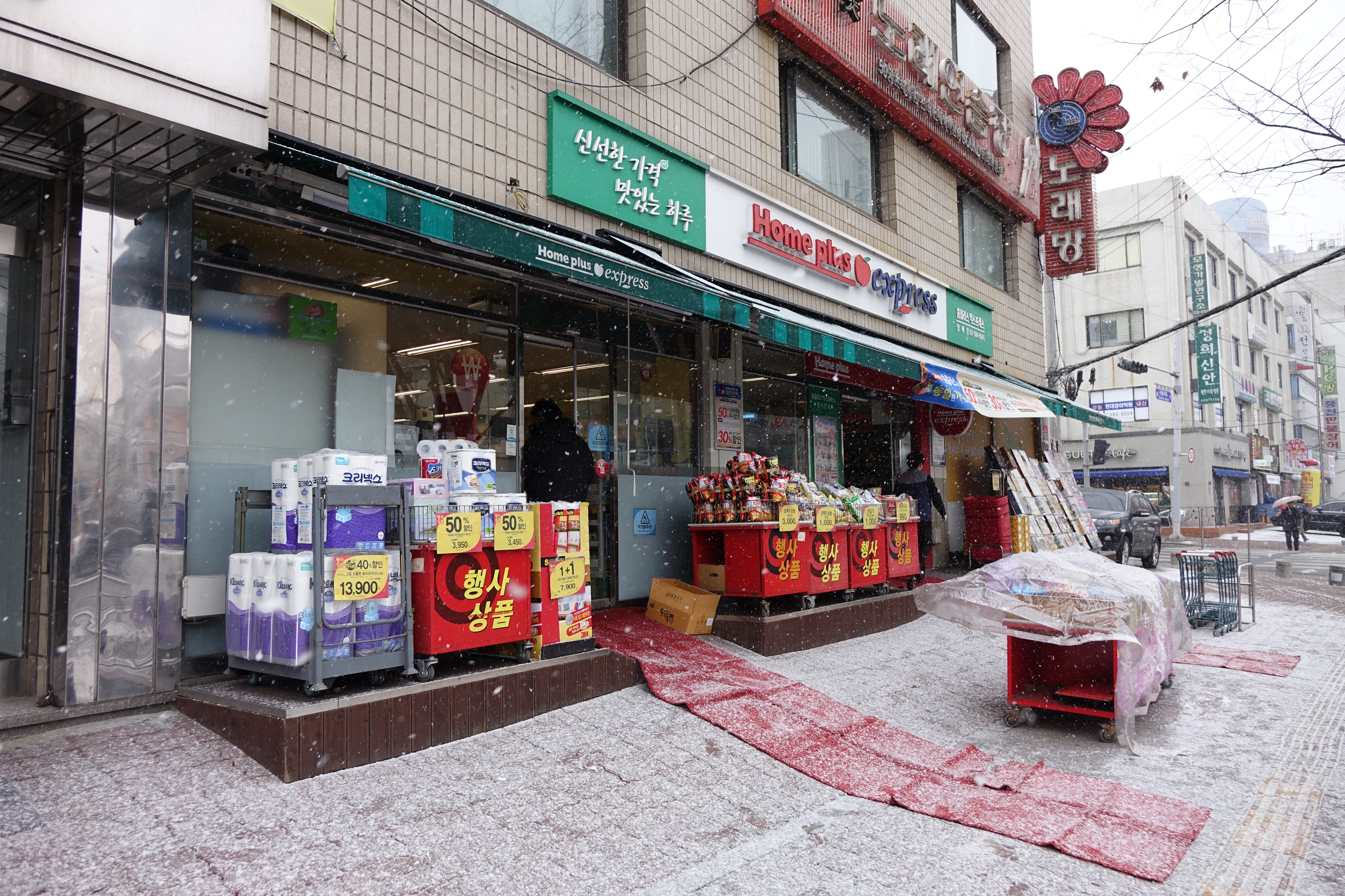 홈플러스 익스프레스 방배점(서울 서초구 서초대로 34(방배동 950-1))